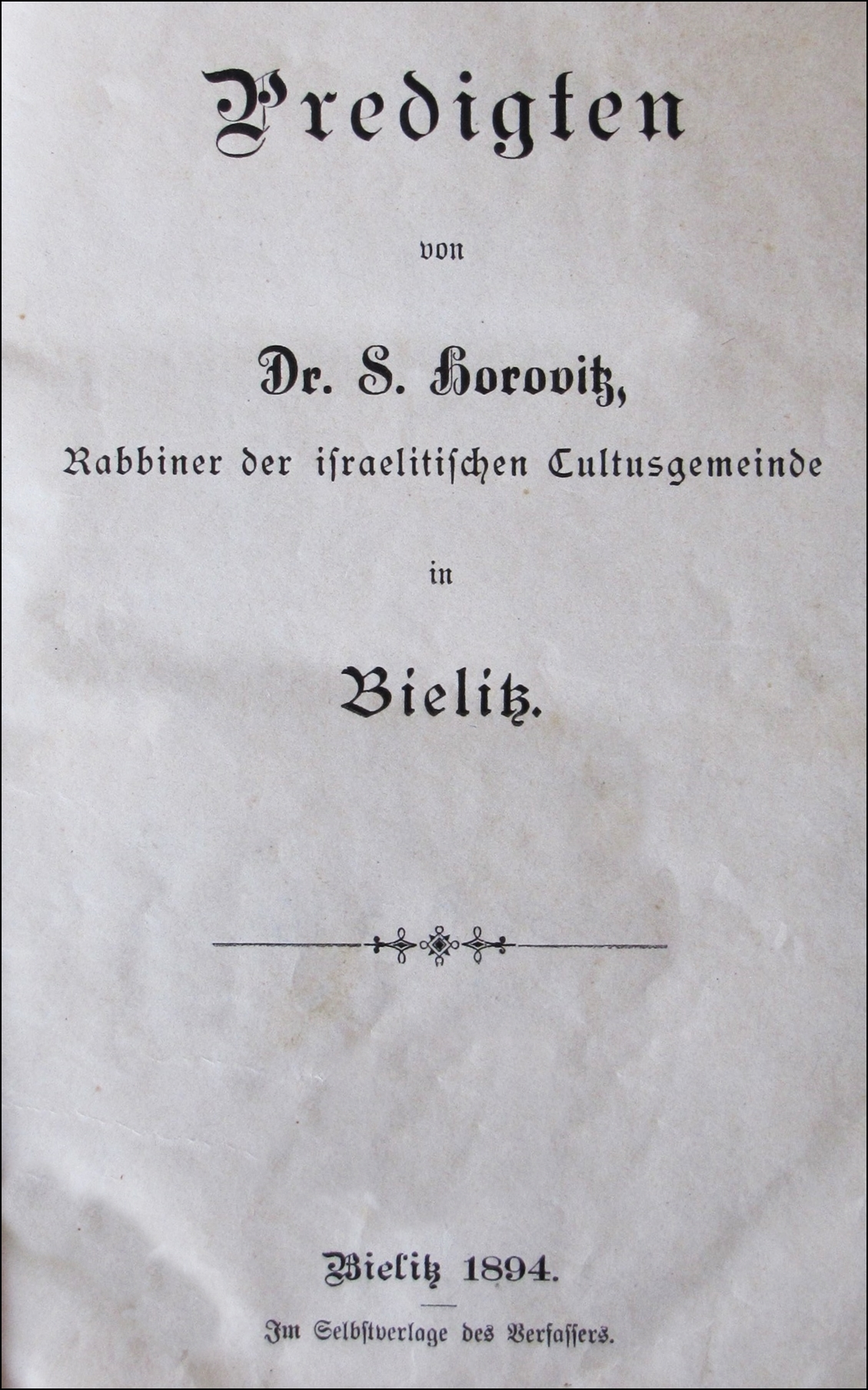 Saul Horowitz, Predigten, Bielitz 1894